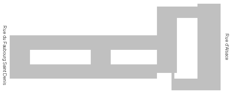 Dessin représentant l'agencement des cours et bâtiments du Passage Delanos Paris Xè